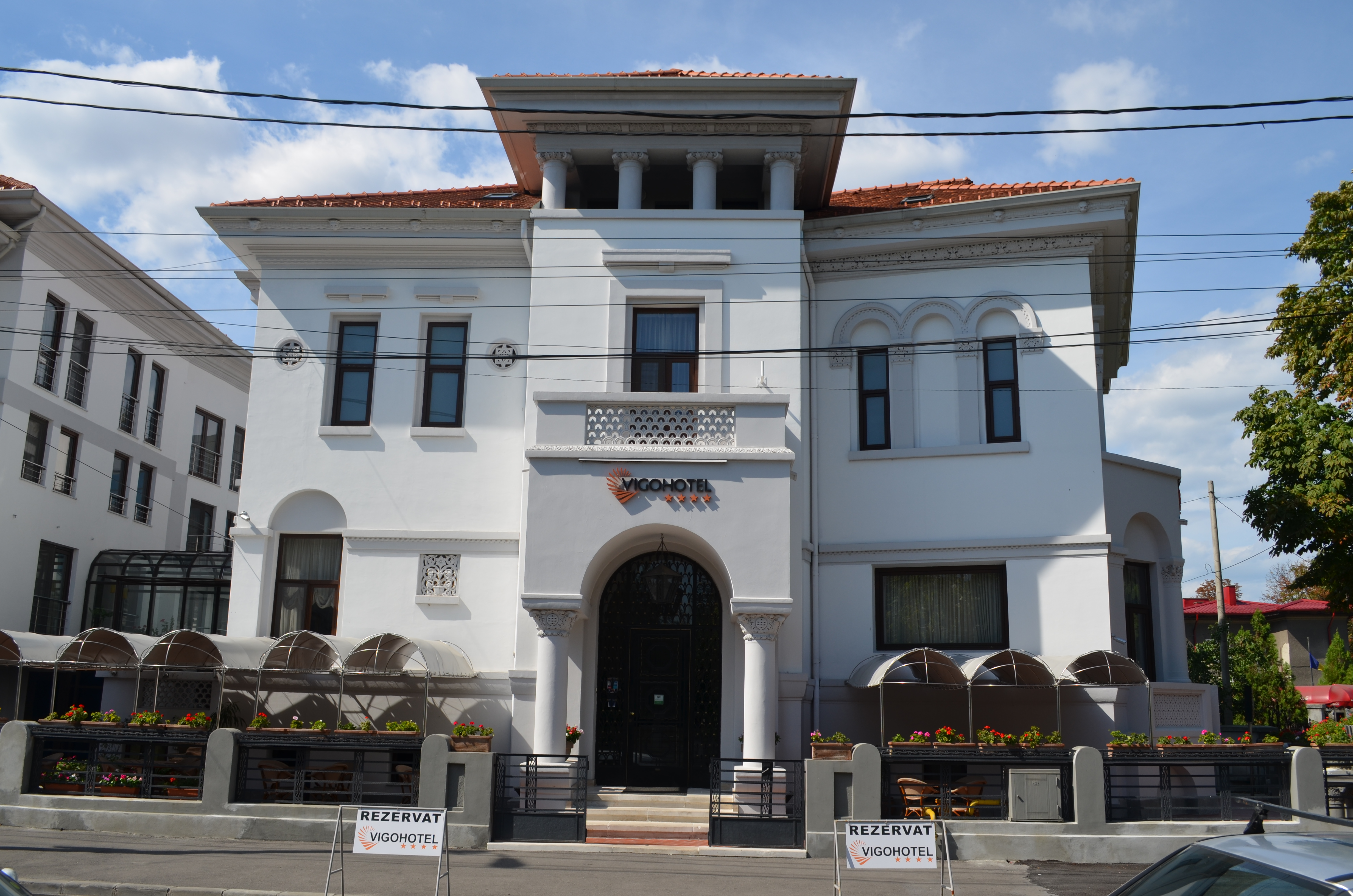 Casa Gheorghe Iosifescu, azi "Vigo Hotel", Bd. Independenței nr. 28, Ploiești